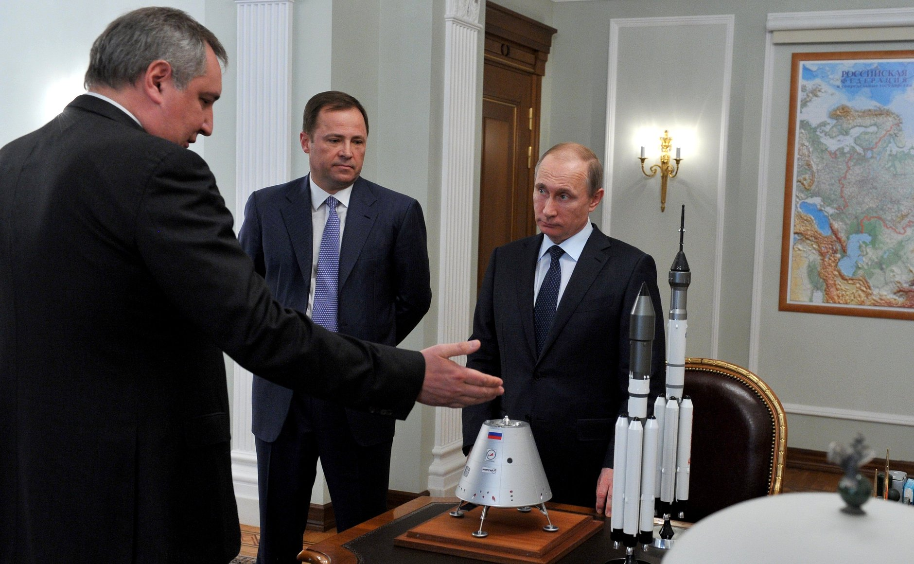 Встреча Владимира Путина с вице-премьером Дмитрием Рогозиным и главой Роскосмоса Игорем Комаровым